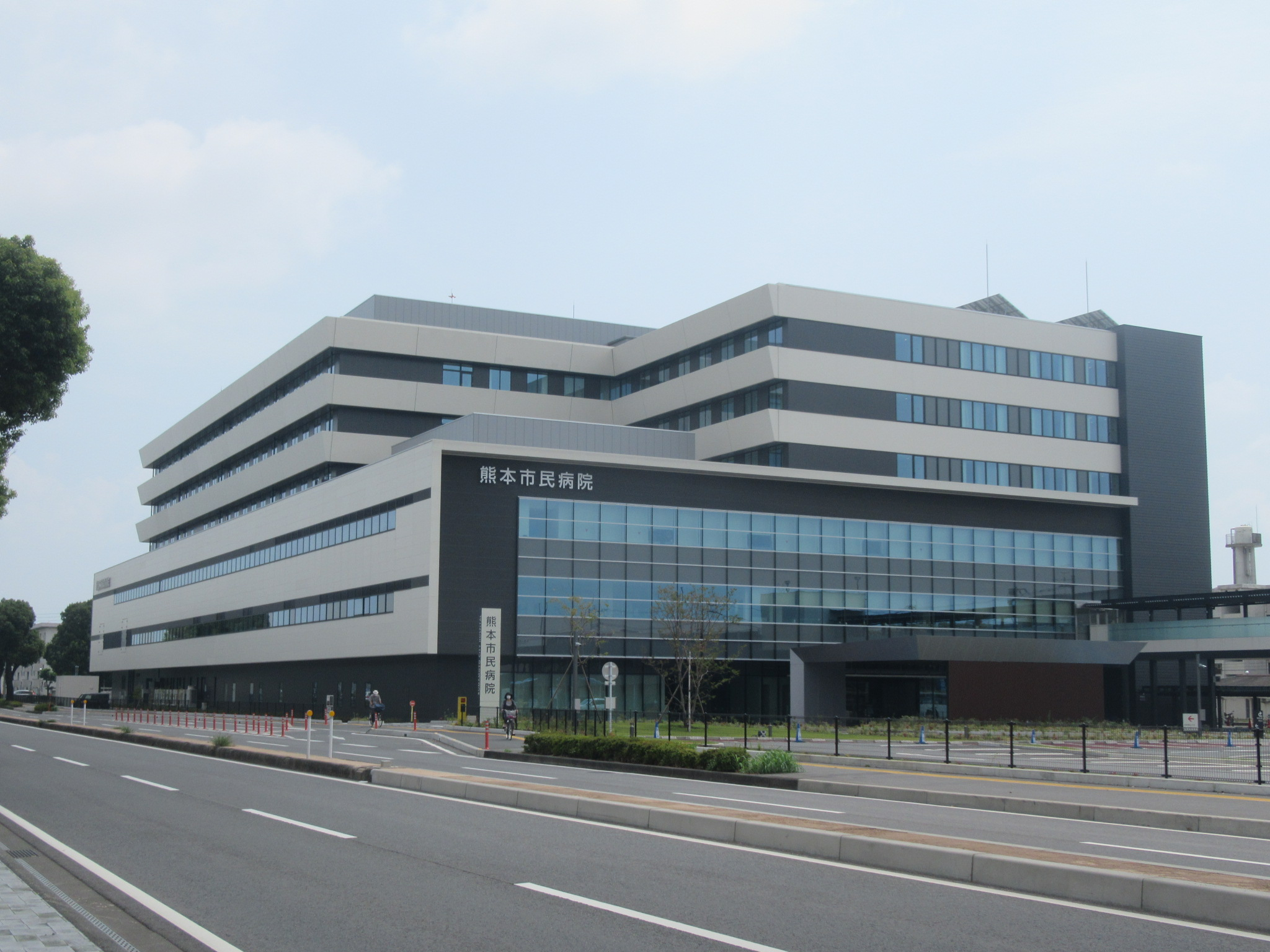 熊本市立熊本市民病院（2020年8月23日撮影）